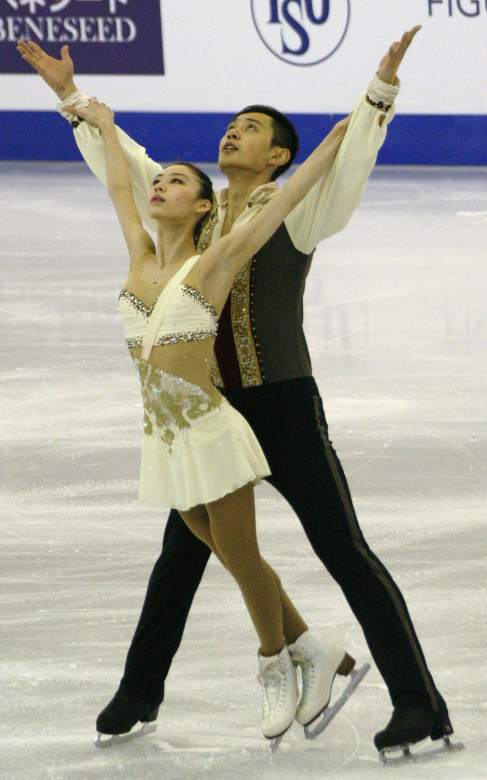 Юй Сяоюй и Цзинь Ян (Китай) на финале Гран-при по фигурному катанию 2015-2016.